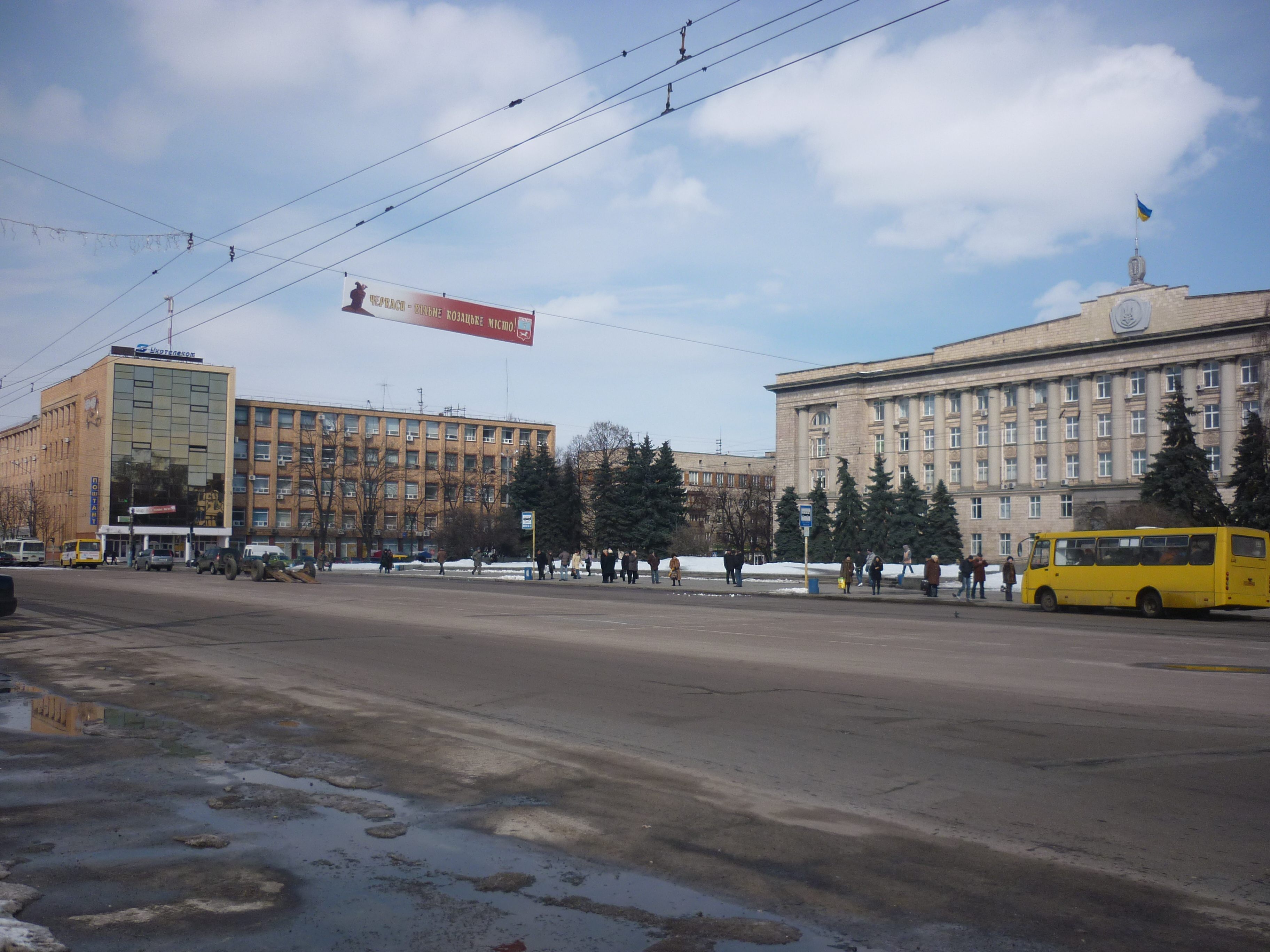 Центральна_площа (Черкаси)